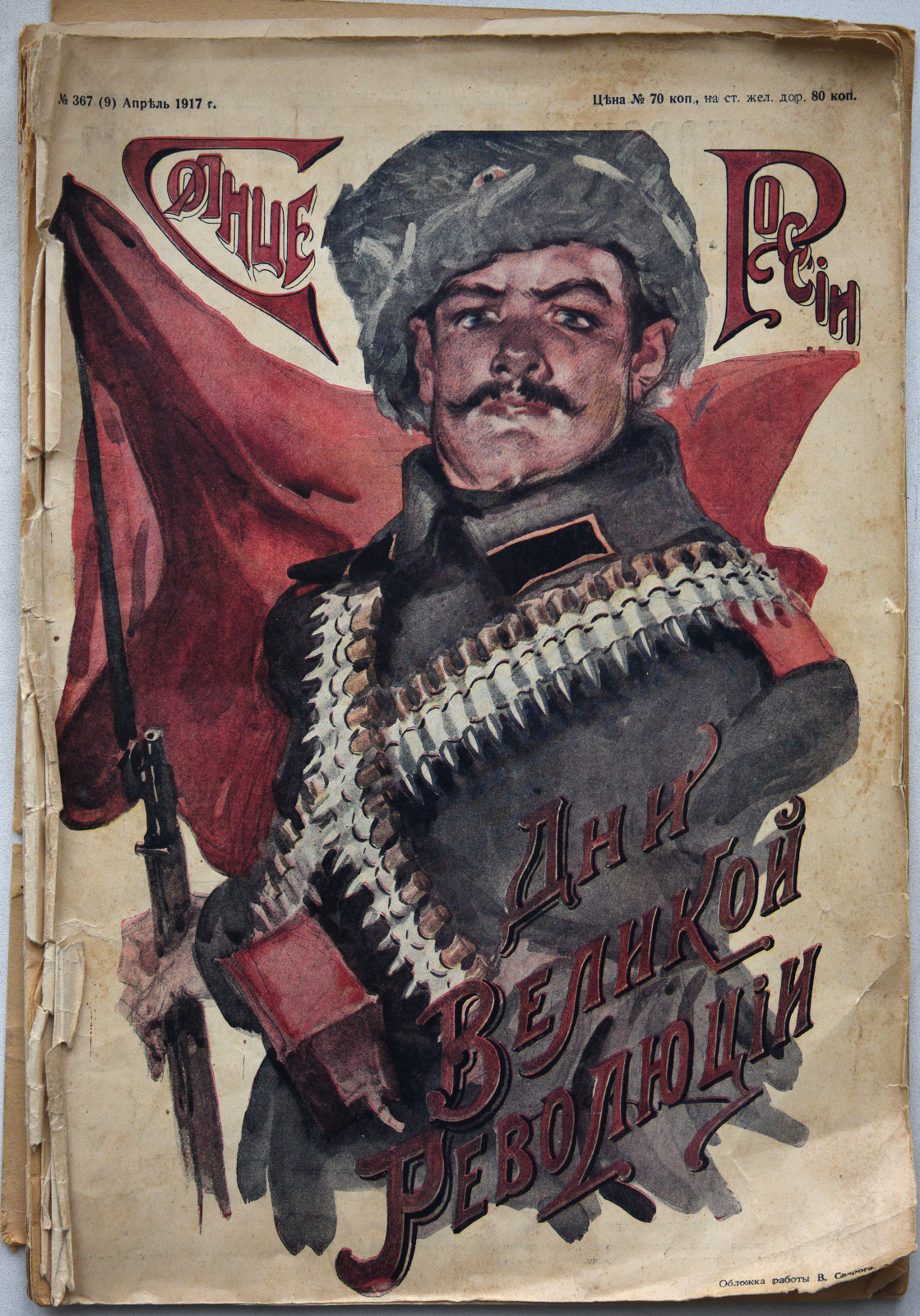 Это скан обложки журнала Солнце России № 9 (367) за апрель 1917 года